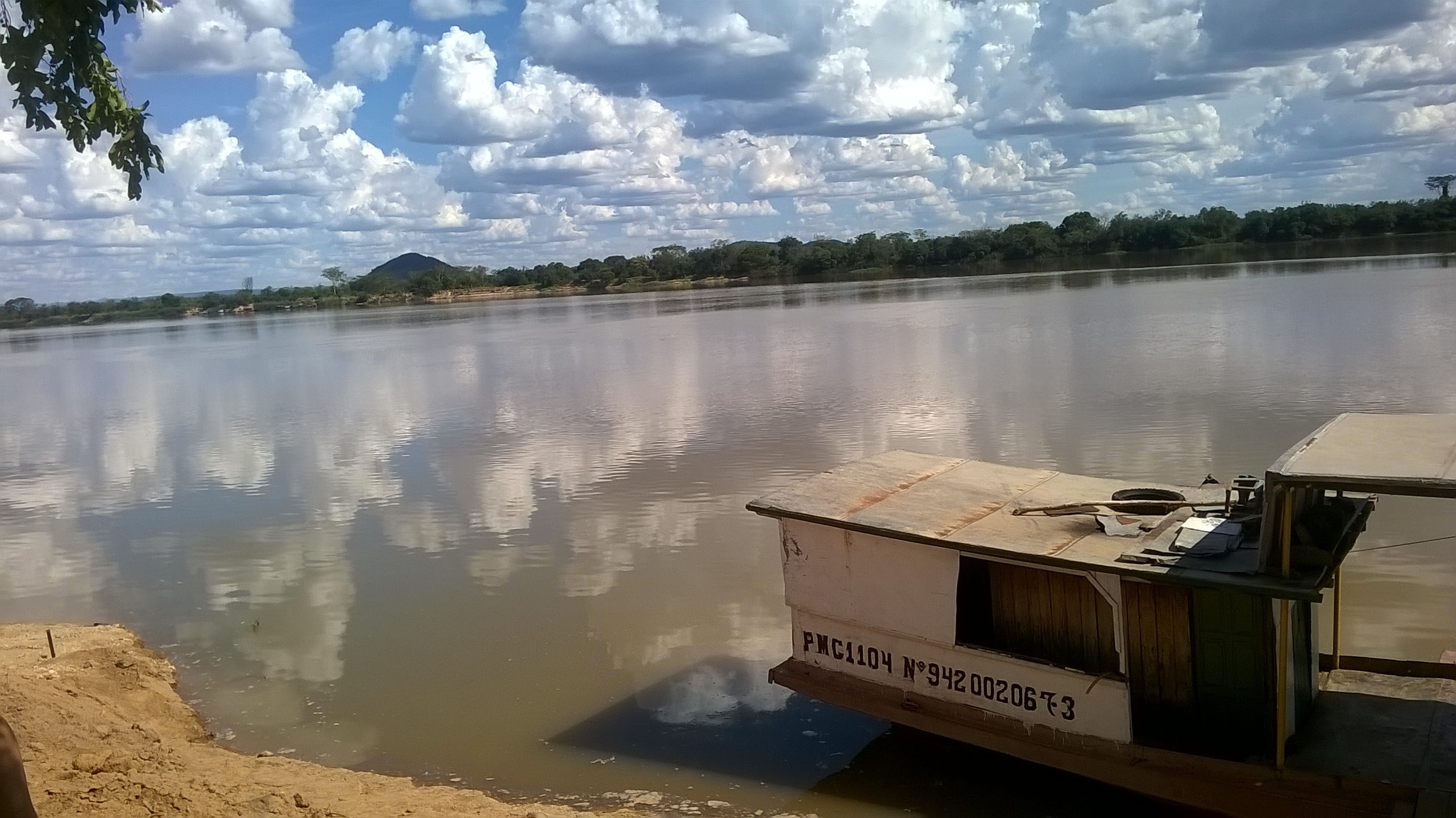 Embarcações no Rio São Francisco em Paratinga. Foto de 22 de janeiro de 2017.